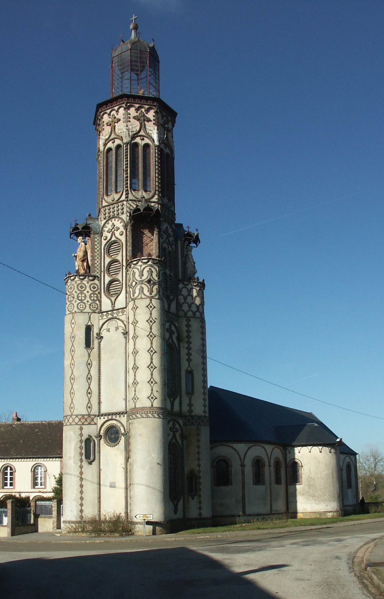 Tour octogonale de style éclectique construite entre 1866 et 1872 flanquée de quatre tourelles supportant les statues des archanges et surmontée d’un lanternon abritant le groupe de la vierge et des enfants auxquels elle est apparue. Reliée à l’abside par un couloir. ISMH 1978. .